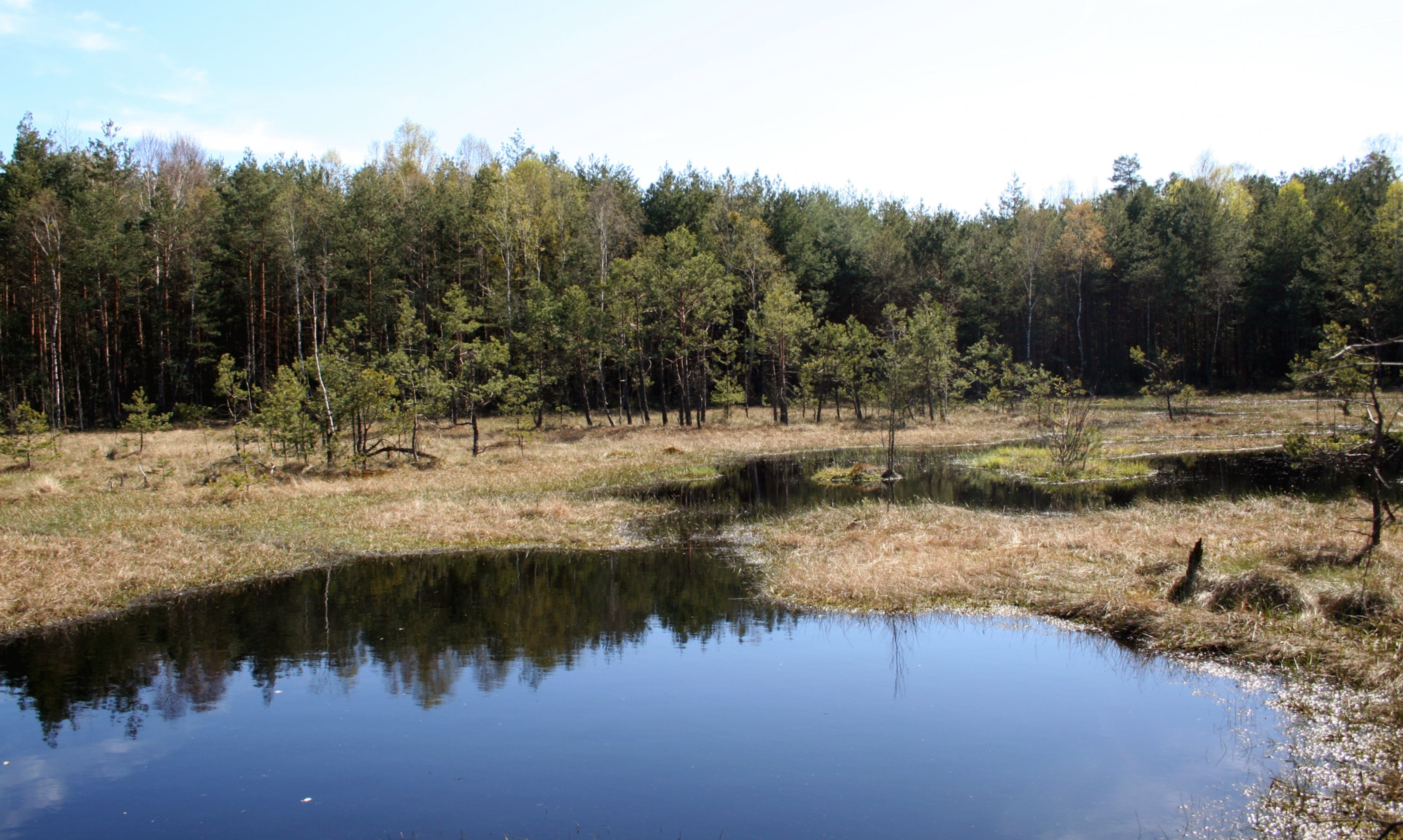 Lasy nad Górną Liswartą - uzytek ekologiczny Jeziorko